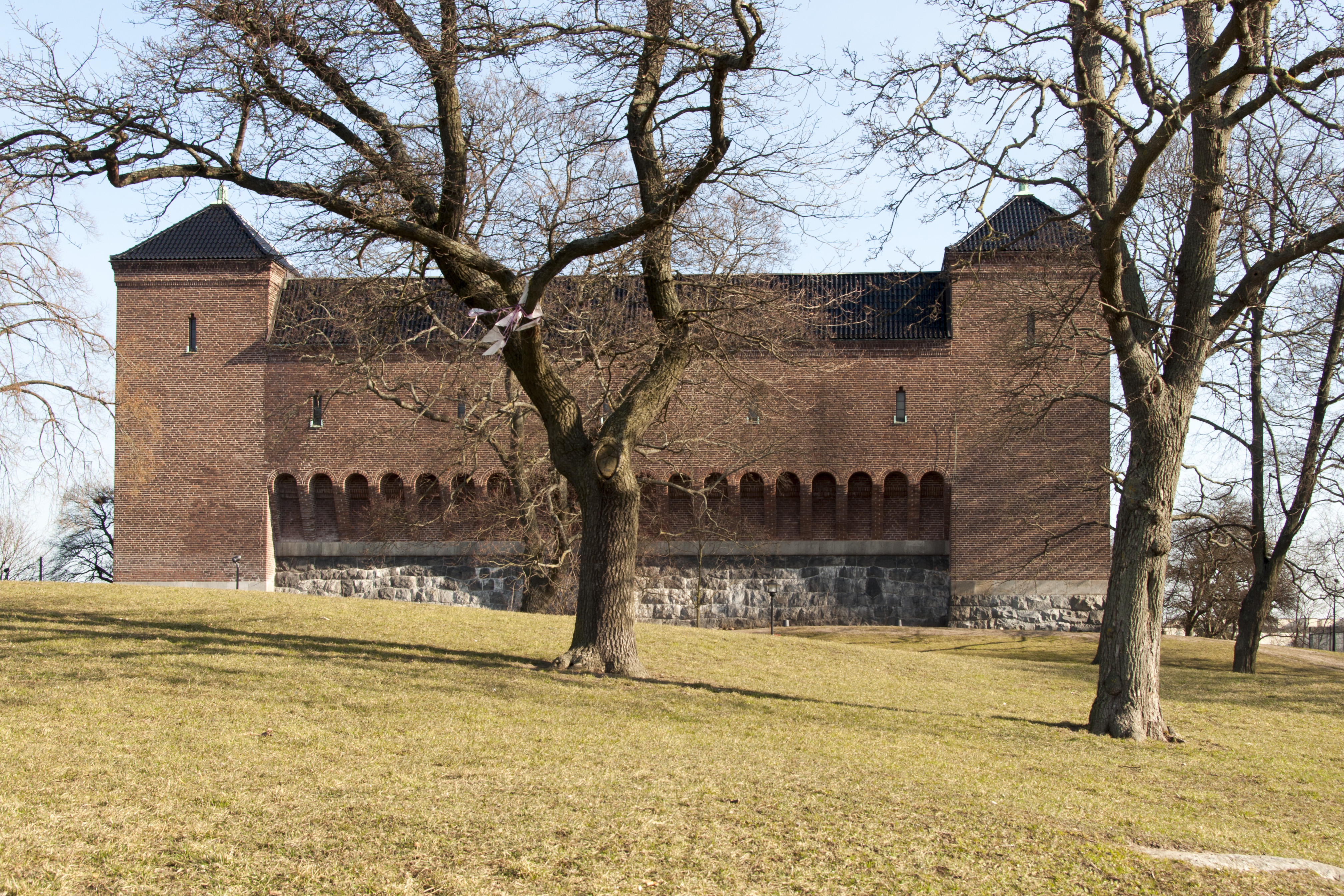 Vanadislundens vattenreservoar, Frejgatan 20A, Nybyggnadsår 1914, Gustaf Ameén (Arkitekt) Stockholms Stads Vattenverket (Byggherre)